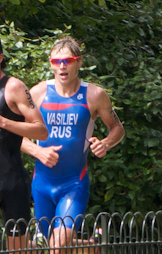 Yvan Vasiliev. Triathlète russe en 2012